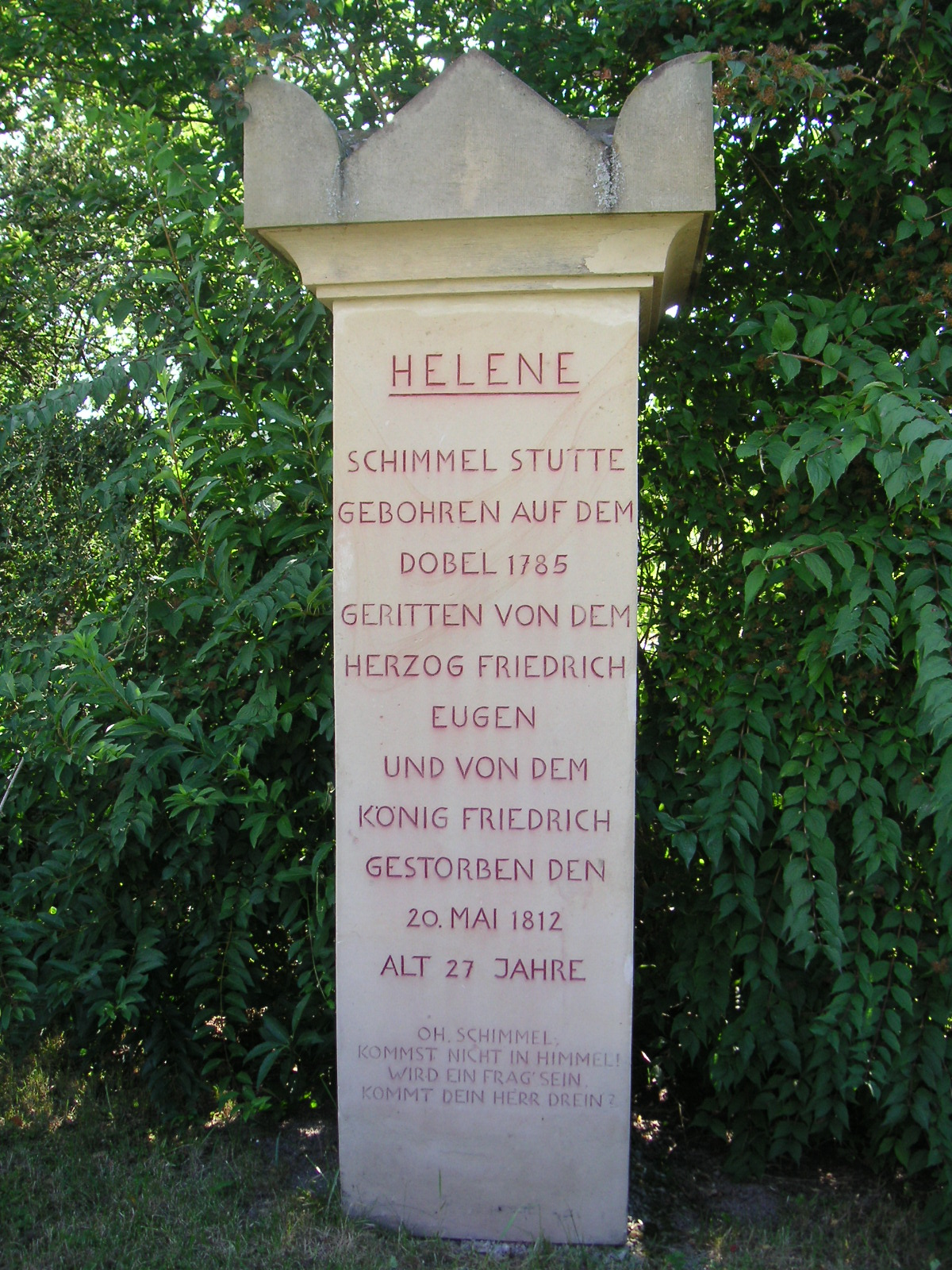 Stutendenkmal - Grabstein für das Leibpferd Helene (1785 - 1812) des Herzogs Friedrich Eugen von Württemberg in Freudental, Kreis Ludwigsburg